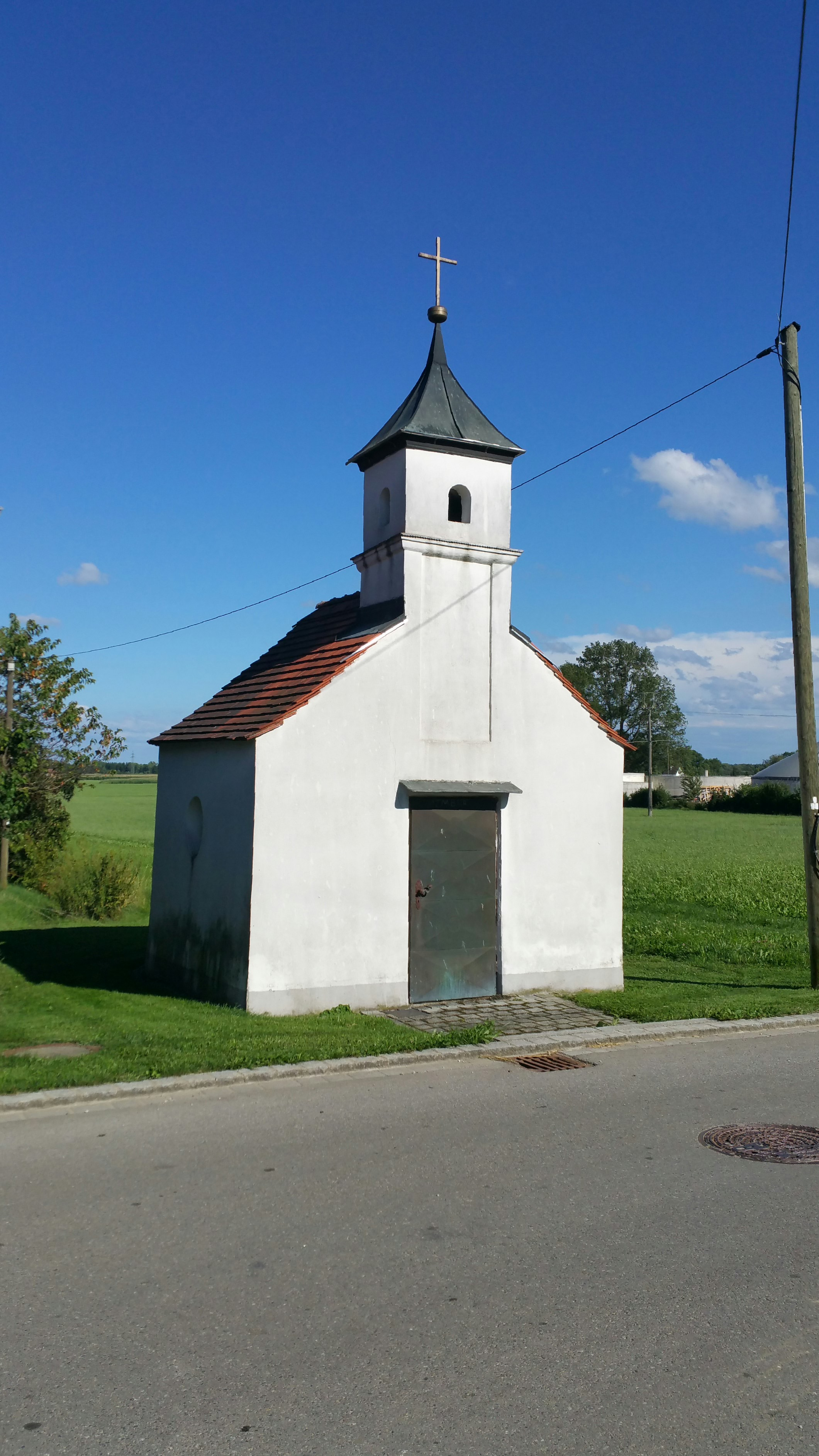 Ortskapelle in Aletshofen